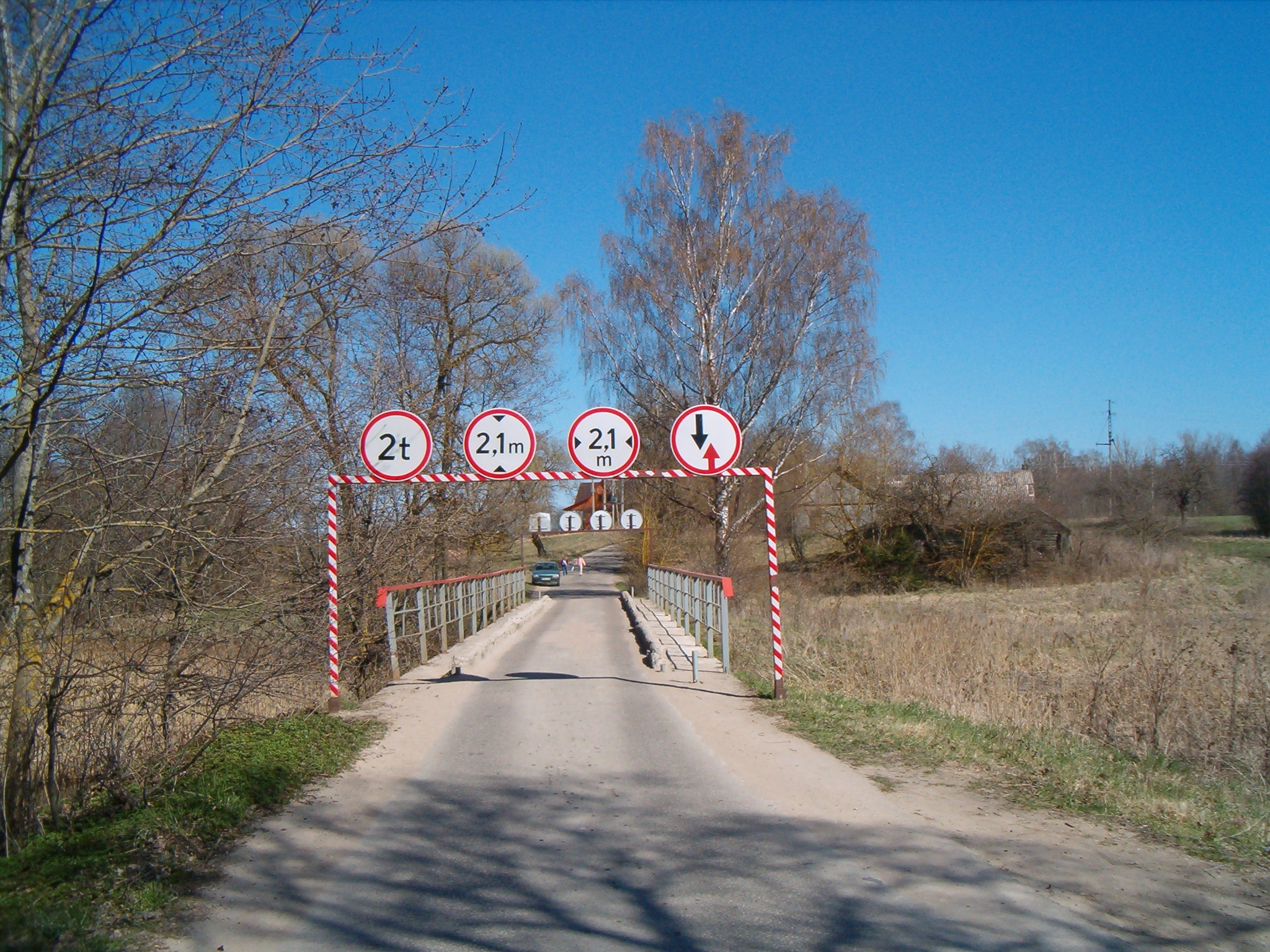 Alanta, Lithuania